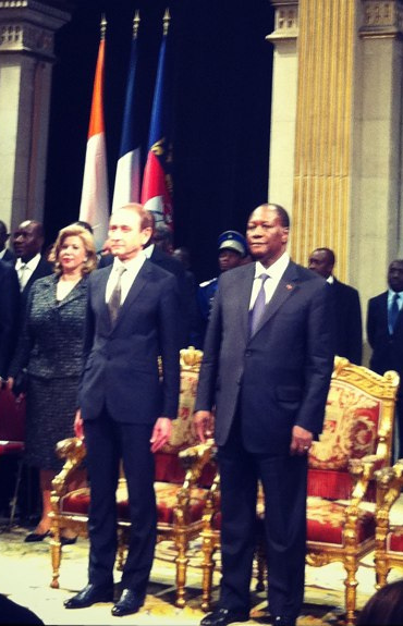 Alassane Ouattara reçu par le maire de Paris Bertrand Delanoë en janvier 2012.